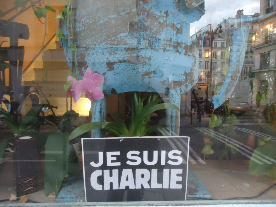 Boutique Je suis Charlie